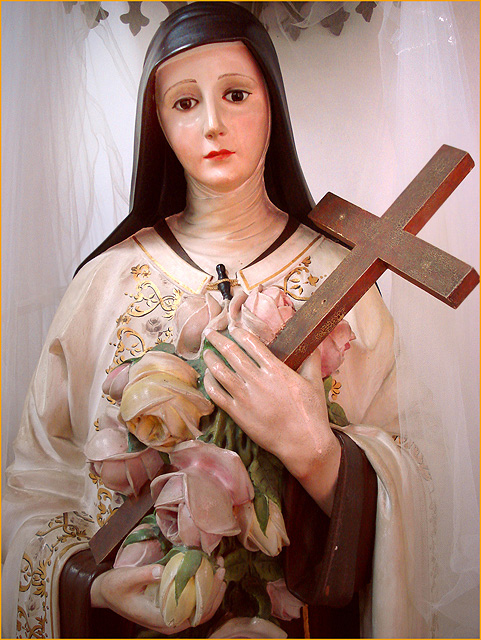 Teresa de Lisieux, estátua de Michelangelo Zambelli, Museu Municipal de Caxias do Sul, Caxias do Sul, Brasil.